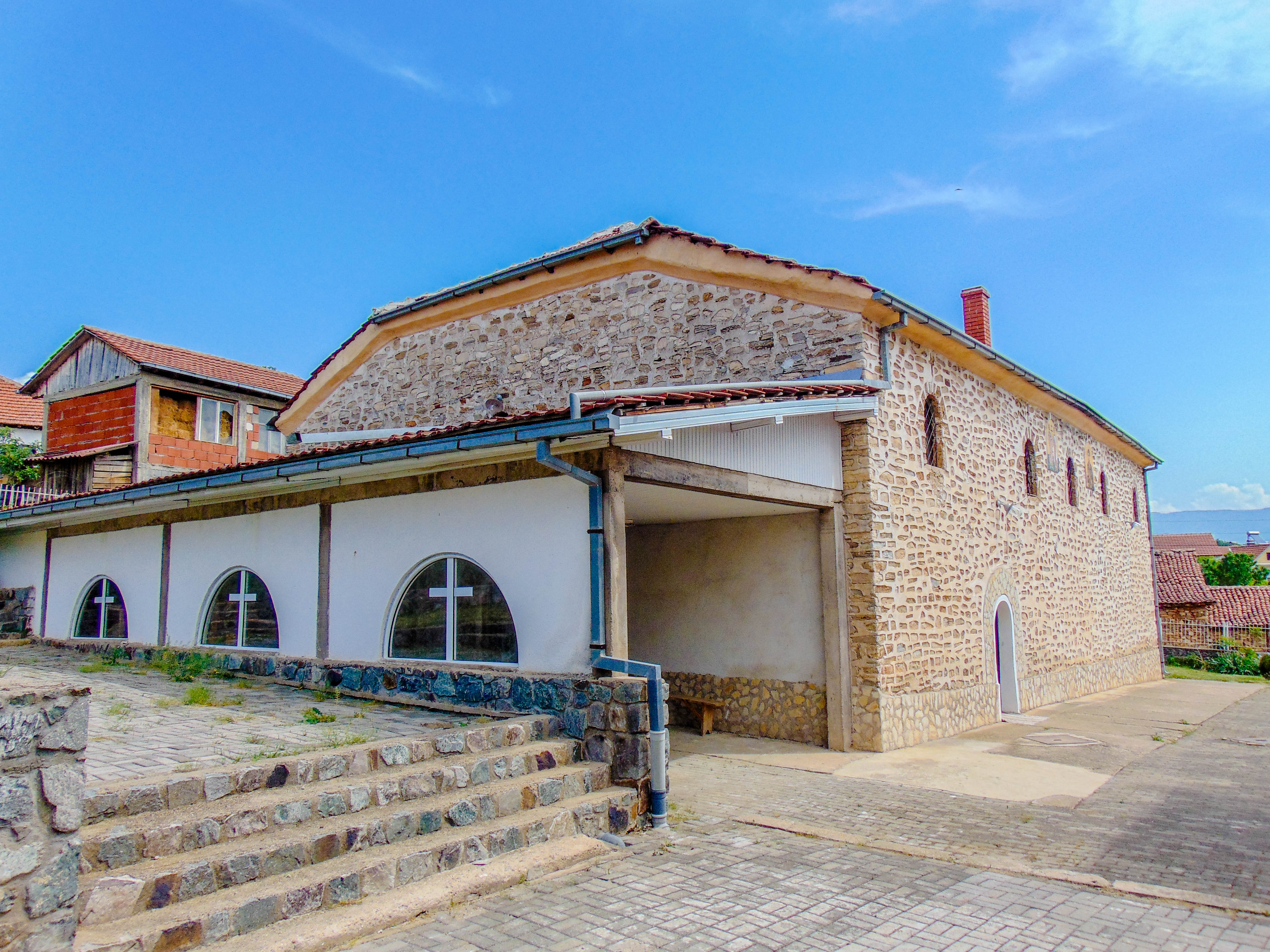 Црква „Св. Константин и Елена“ - Раклиш